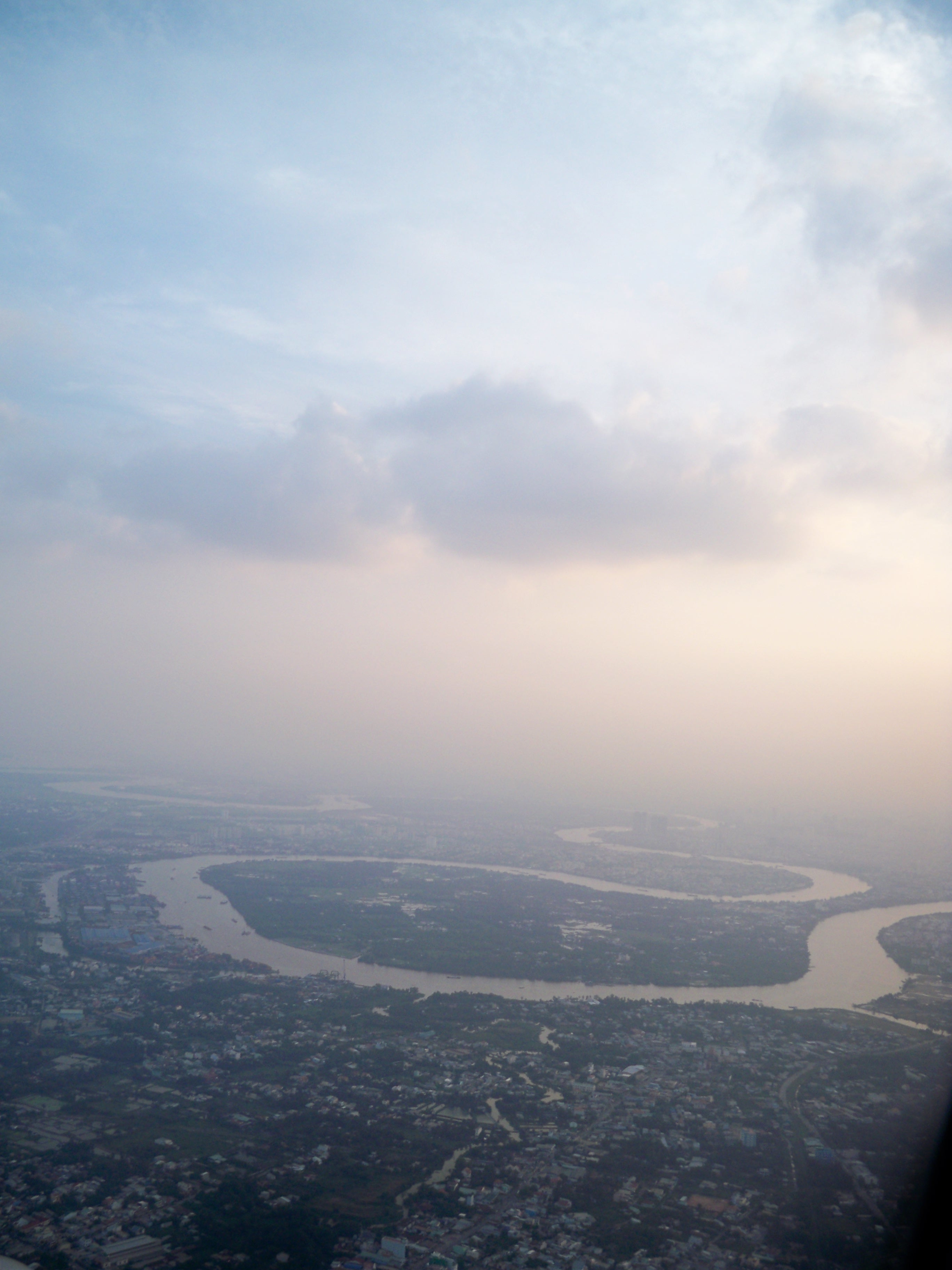 Chụp từ máy bay